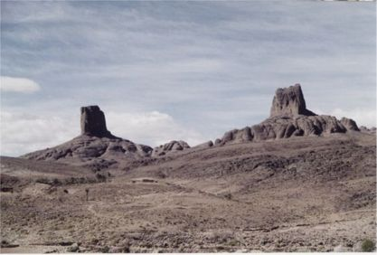 Autorisation accordée par:Webmeaster:Beatrice Hennequin